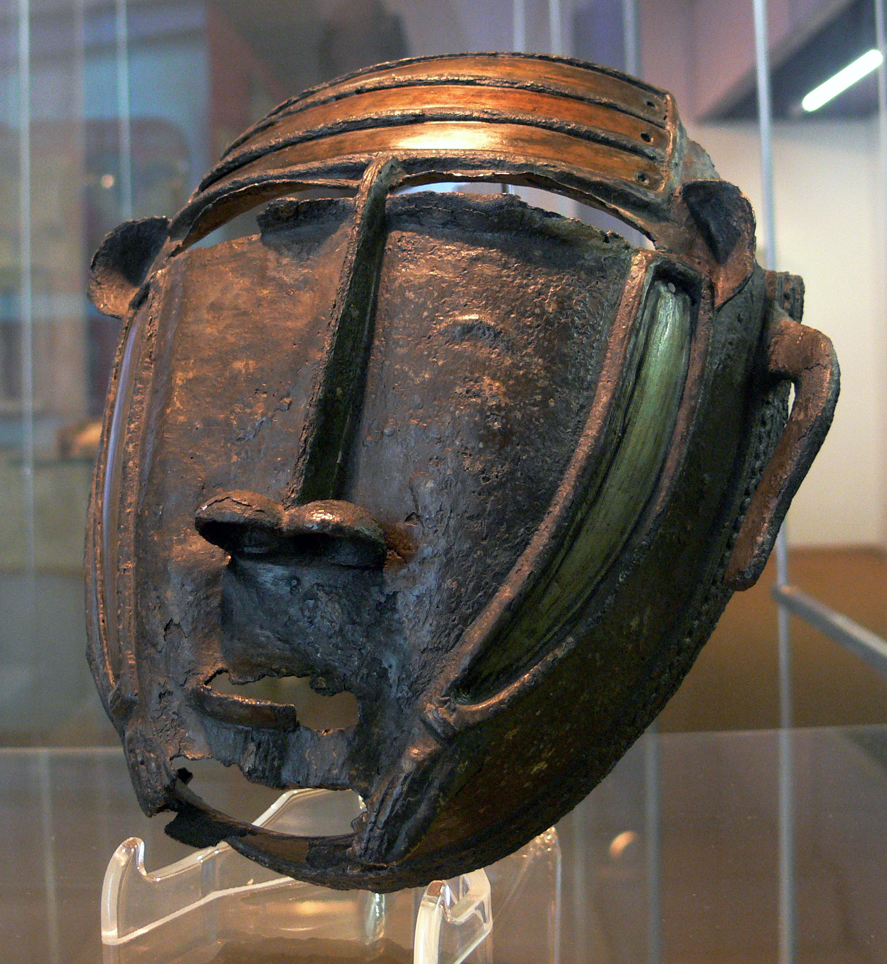 Stuttgart, Linden-Museum Gesichtsmaske des Do-Bundes; Zinn, Kupfer und Messingblech; Islamische Malinke (Elfenbeinküste), um 1770–1890, Inv. Nr. F 51.859 L